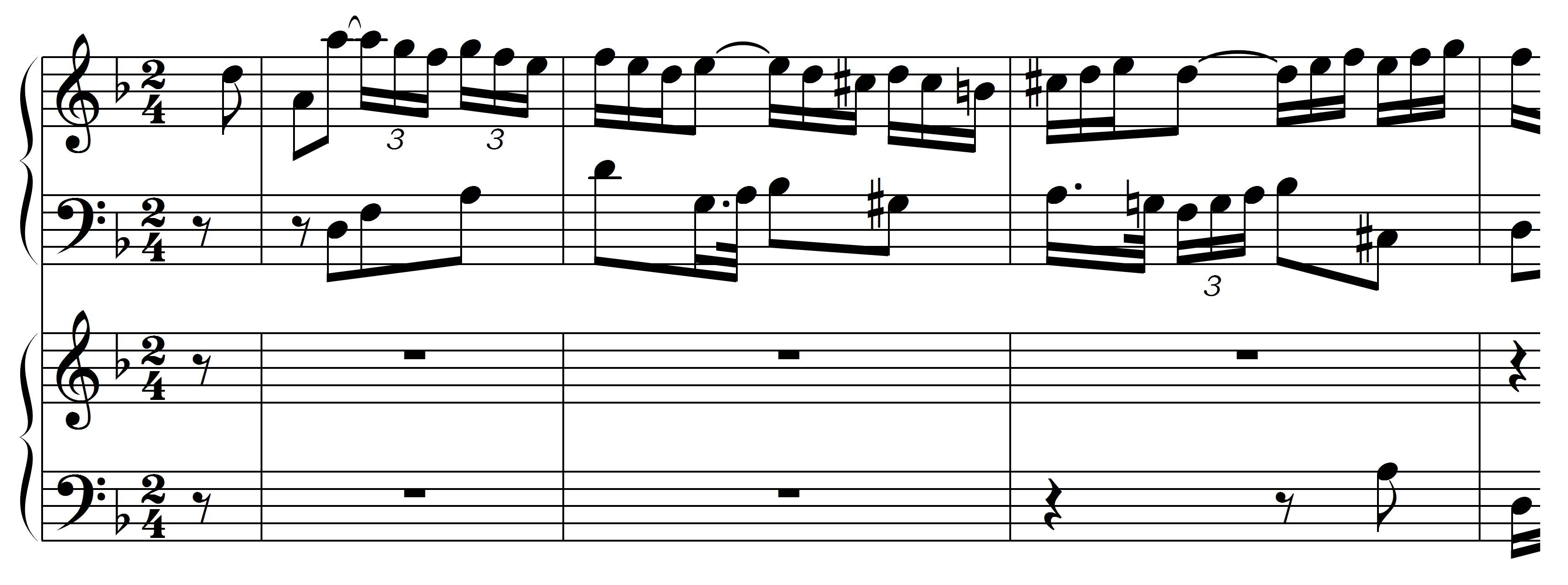 Bach, JS, Incipit Contrapunctus 18,2, BWV 1080